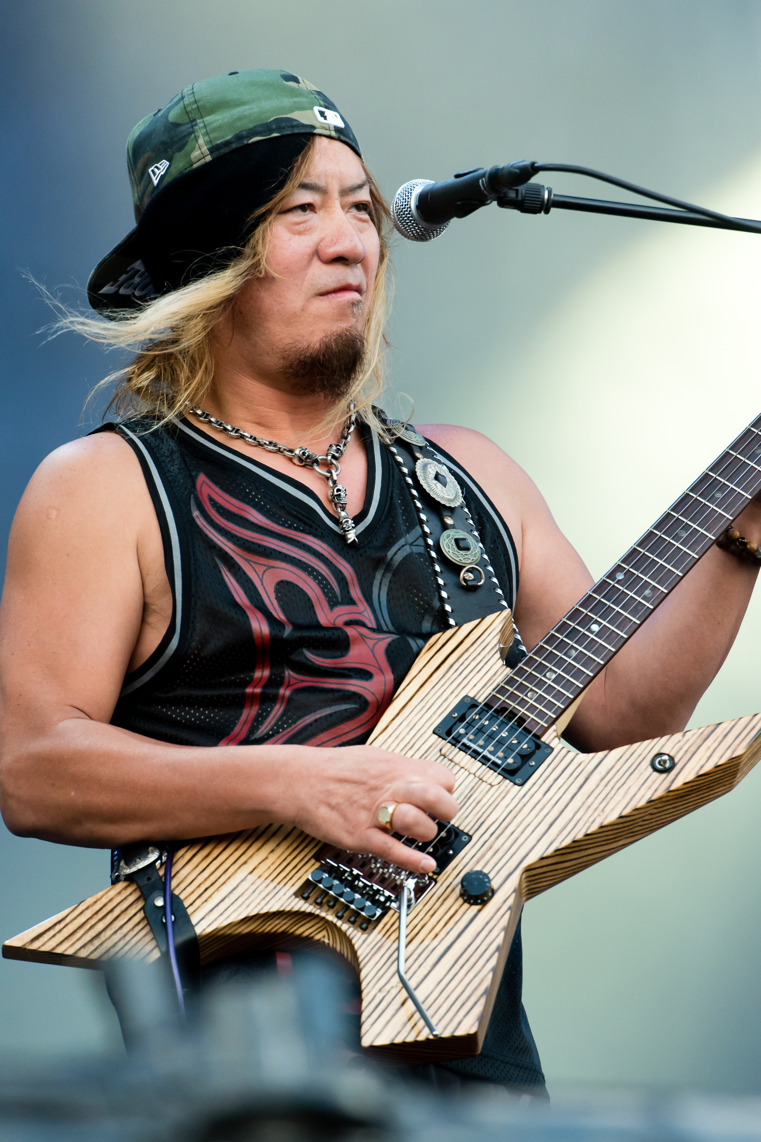 Loudness beim Wacken Open Air 2016